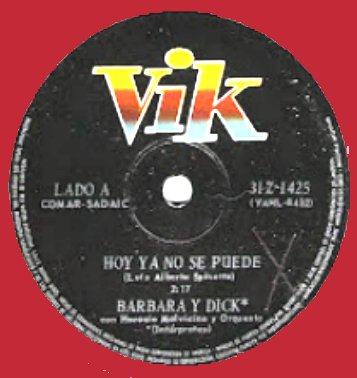 Disco del dúo Barbara y Dick. Lado A. "Hoy ya no se puede" (autor Luis Alberto Spinetta. 1969.